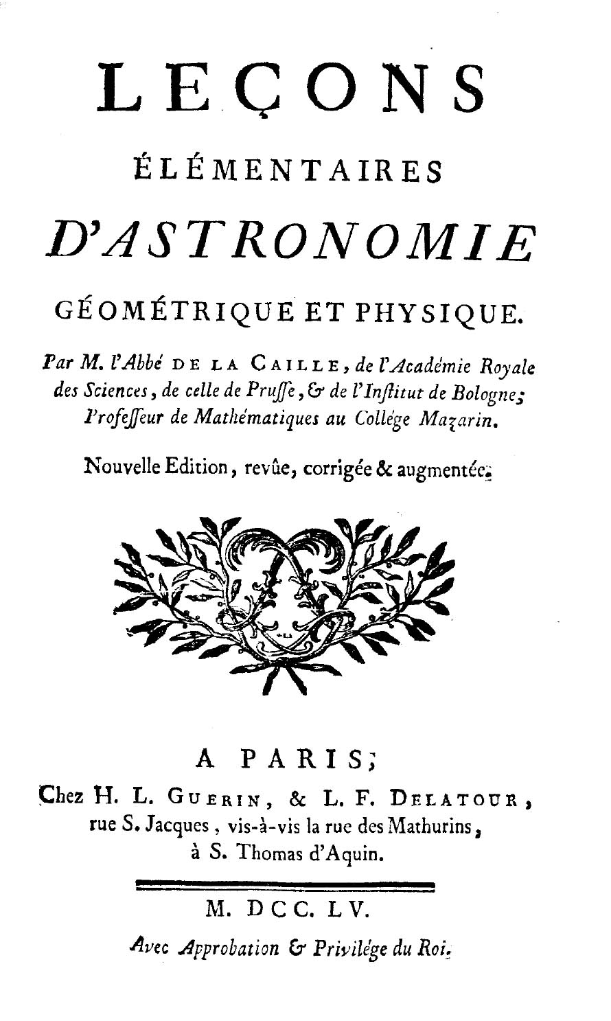 Leçons elementaires d'astronomie géométrique et physique par m. l'Abbé de La Caille de l'Académie Royale des Sciences .... - A Paris : chez H. L. Guerin & L.F. Delatour, rue S. Jacques …, 1755. - vj, [2], 375, [1] p., 9 c. di tav. : ill. ; 8º .